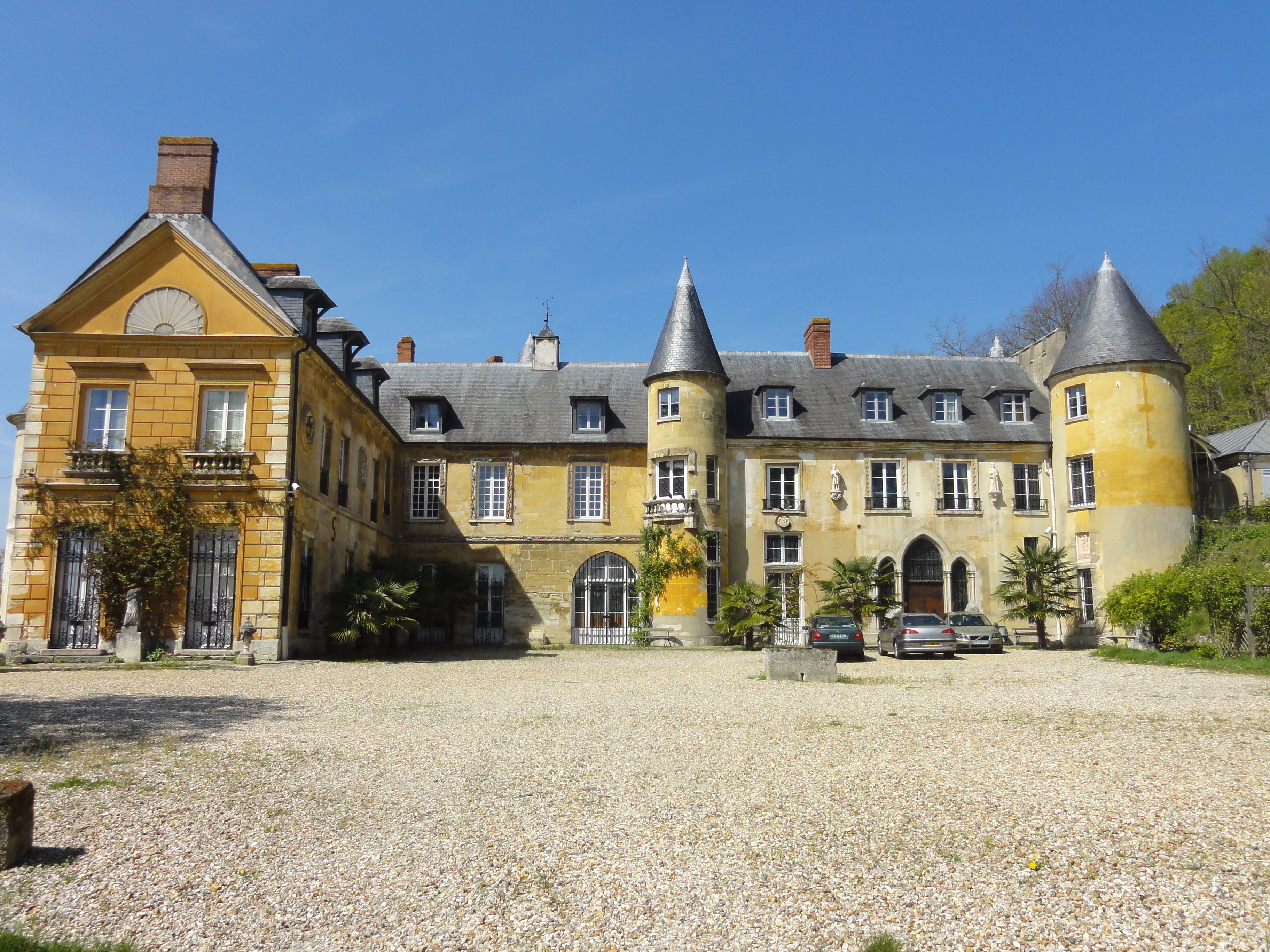 Château de Vaux-sur-Seine - voir titre.